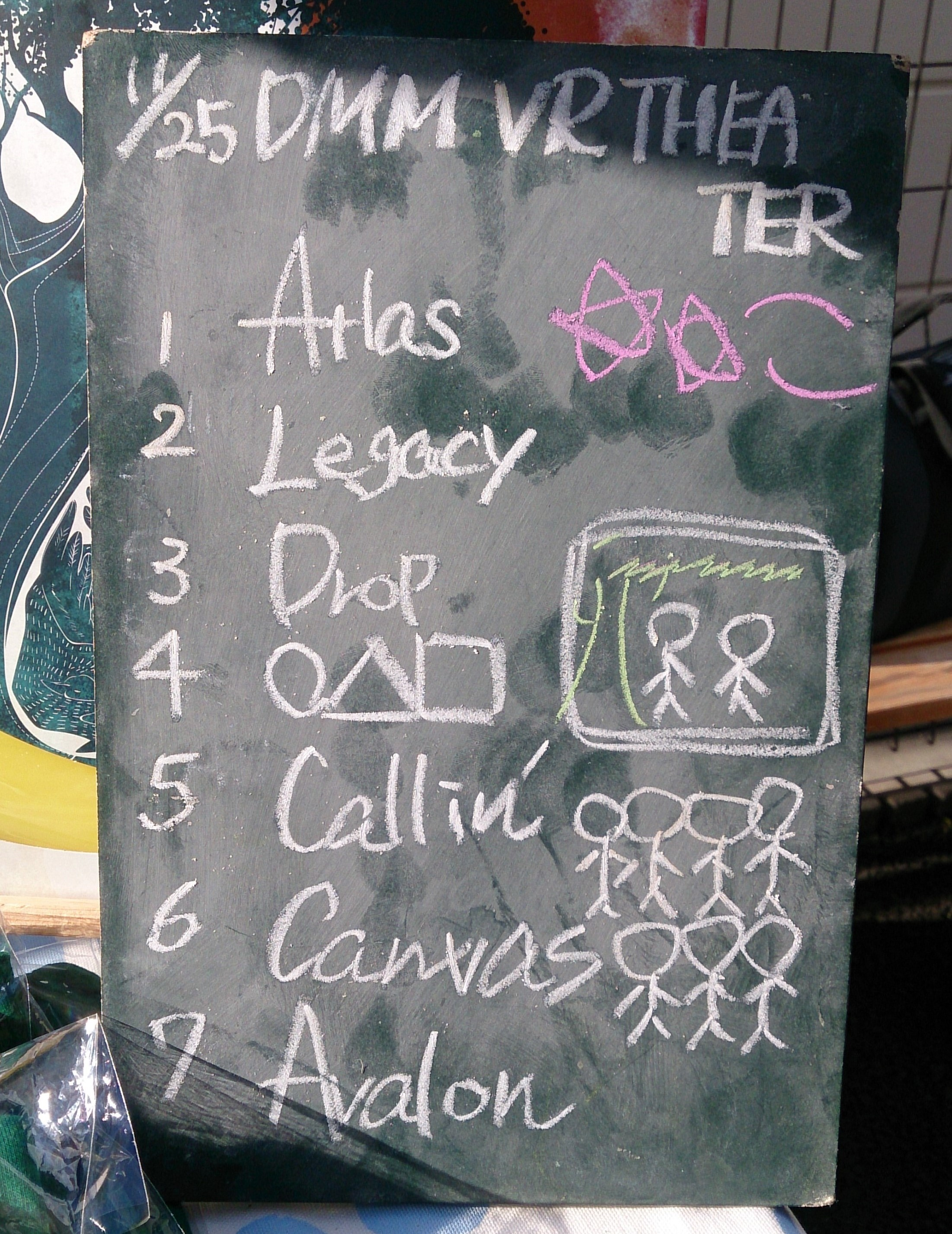 amiinAセトリボード(20171125(1))